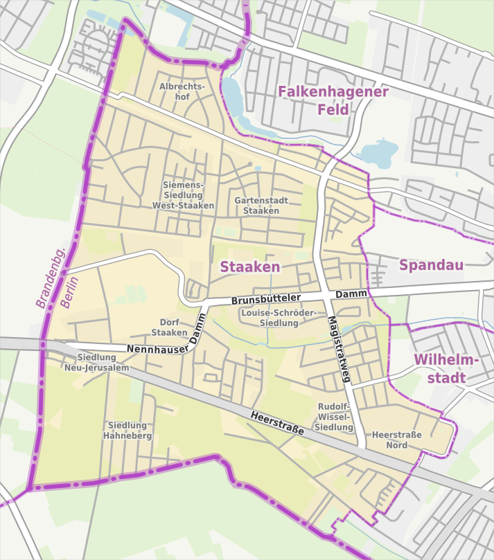 Übersichtskarte der Straßen und Ortslagen in Berlin-Staaken